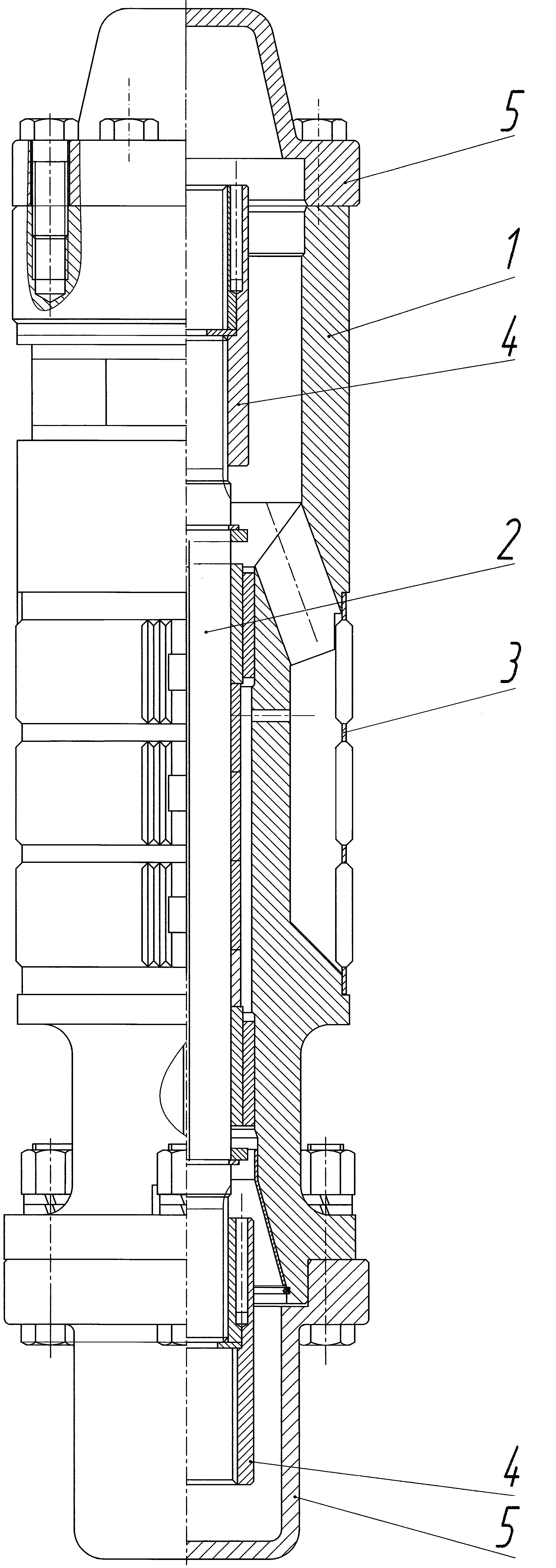 Схема приемного модуля для УЭЦН